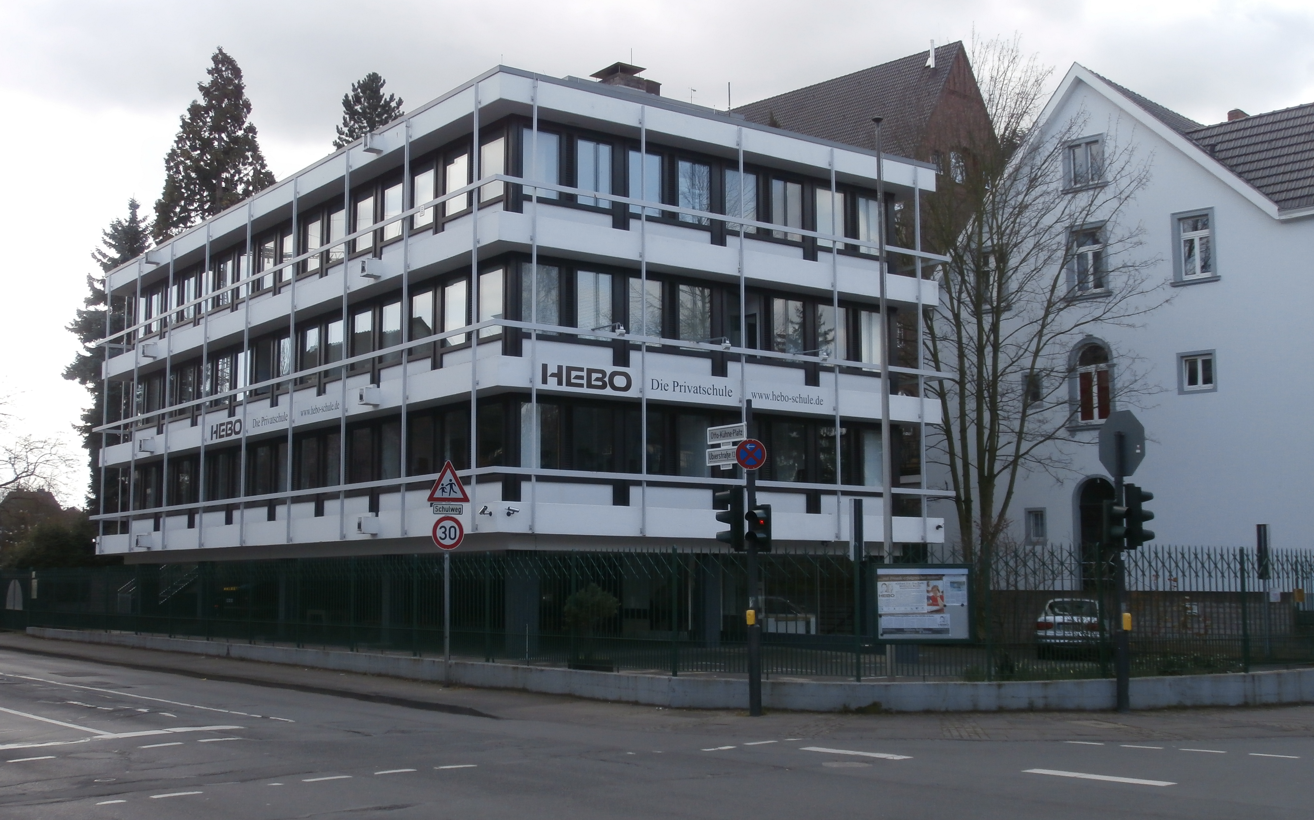 Ehemalige Botschaft von Kamerun, Rheinallee 76, Bad Godesberg